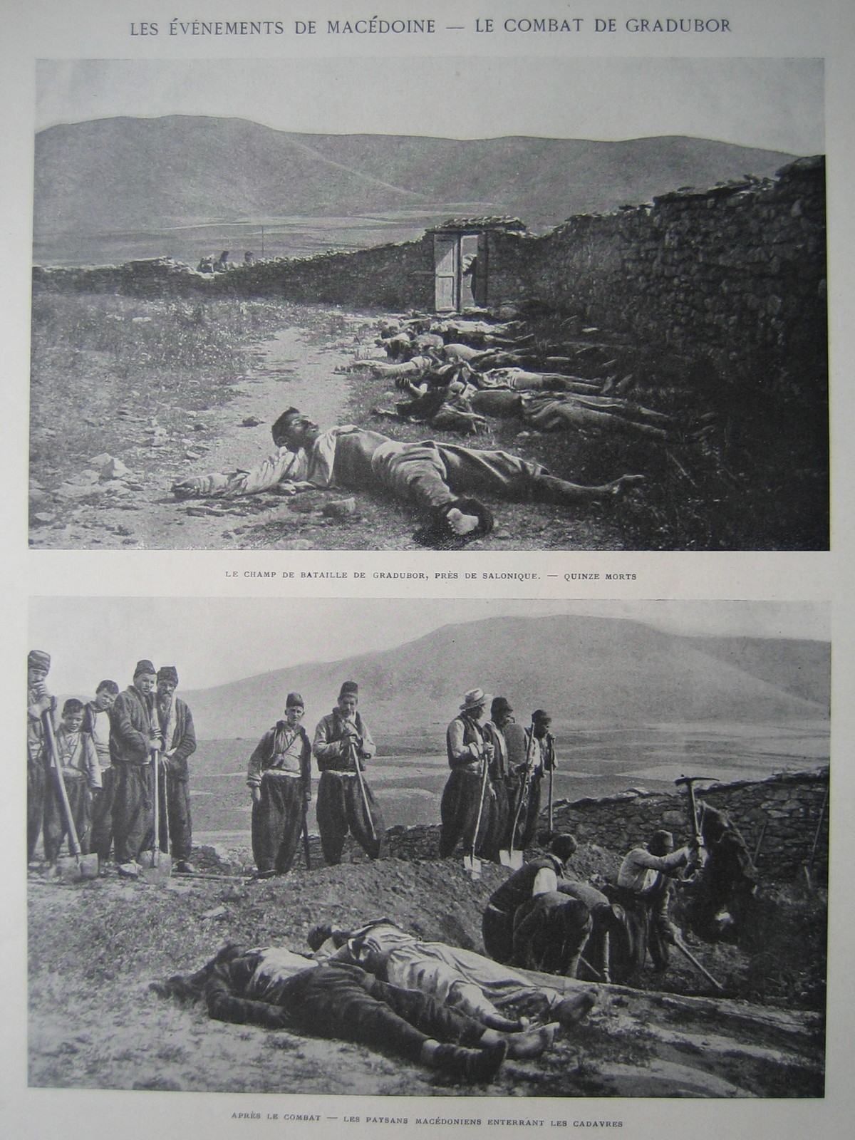 Убити селяни в Градобор в 1903 г.